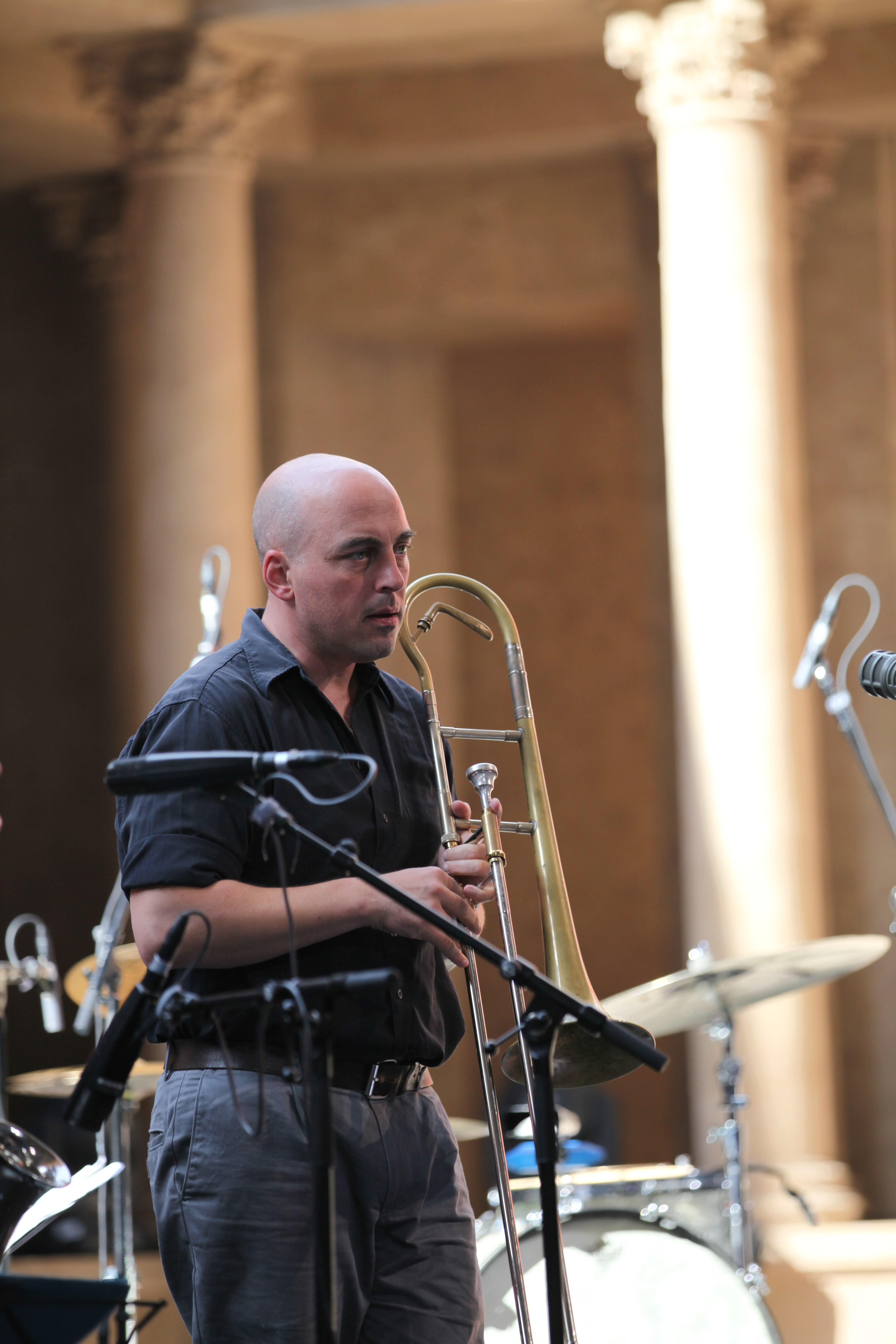 Alien Ensemble auf dem Heimatsound-Festival 2015 in Oberammgergau Mathias Götz an der Posaune